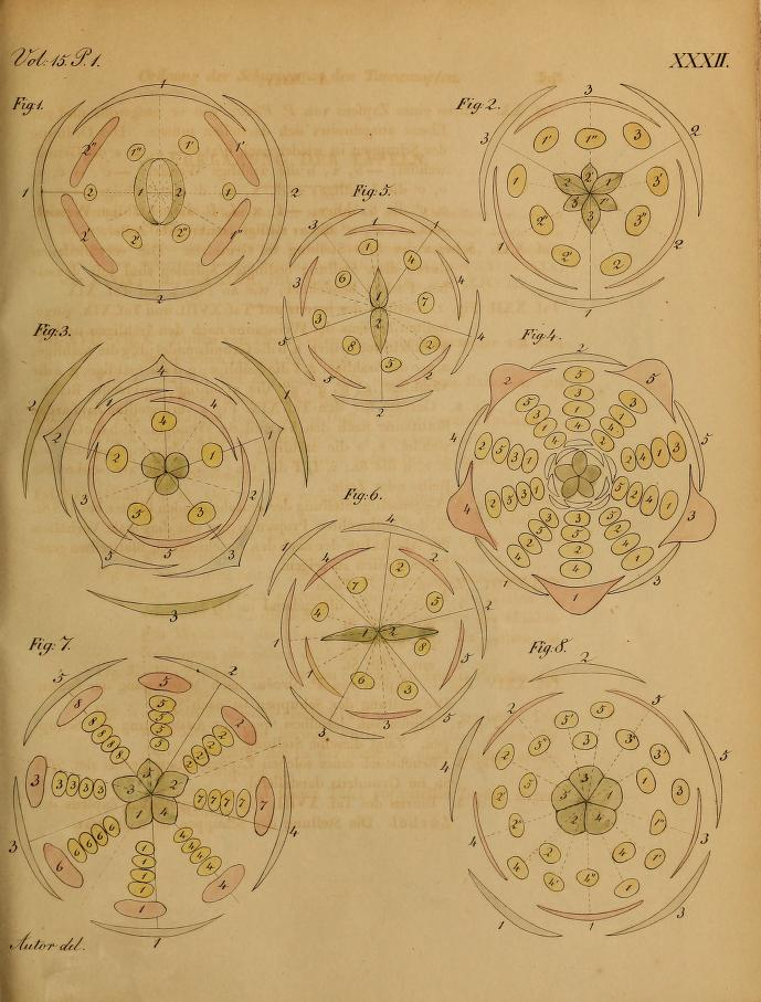 Étude du cône du sapin commun (Abies alba), dessin d'Alexander Braun (1805–1877), botaniste allemand